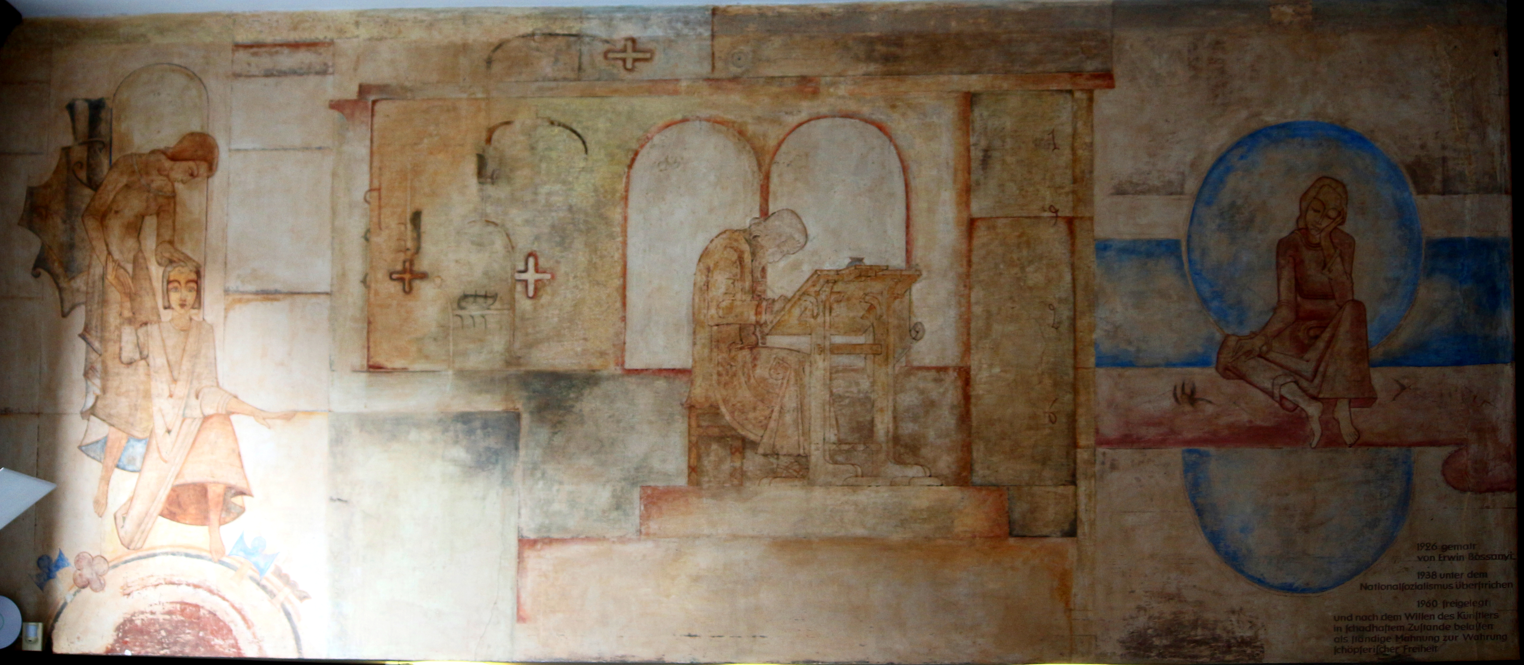 Wandgemälde von Erwin Bossanyi von 1926 im Lesesaal der Stadtbibliothek Lübeck